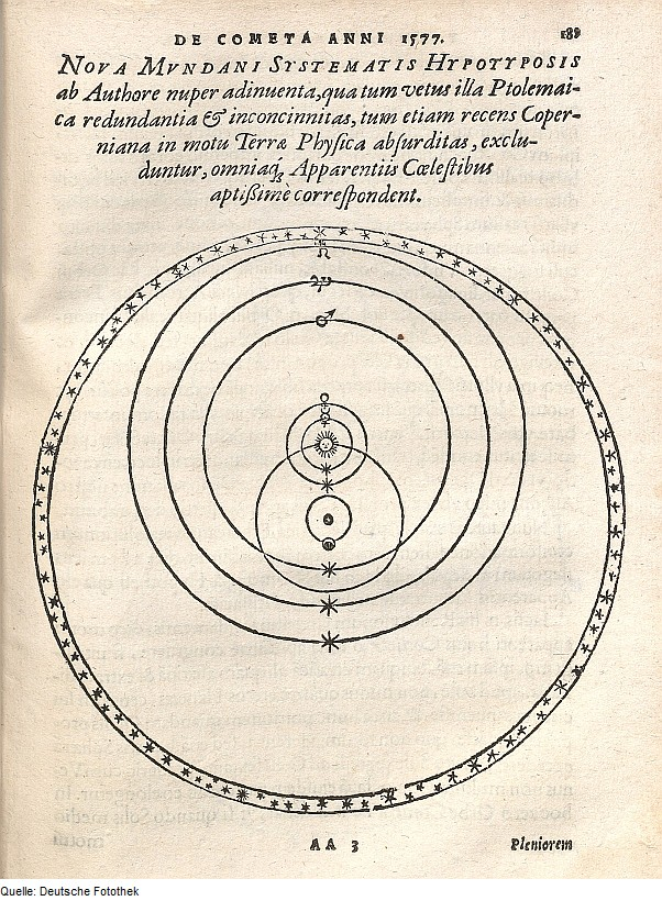 Original image description from the Deutsche Fotothek Astronomie & Planet & Himmelskörper